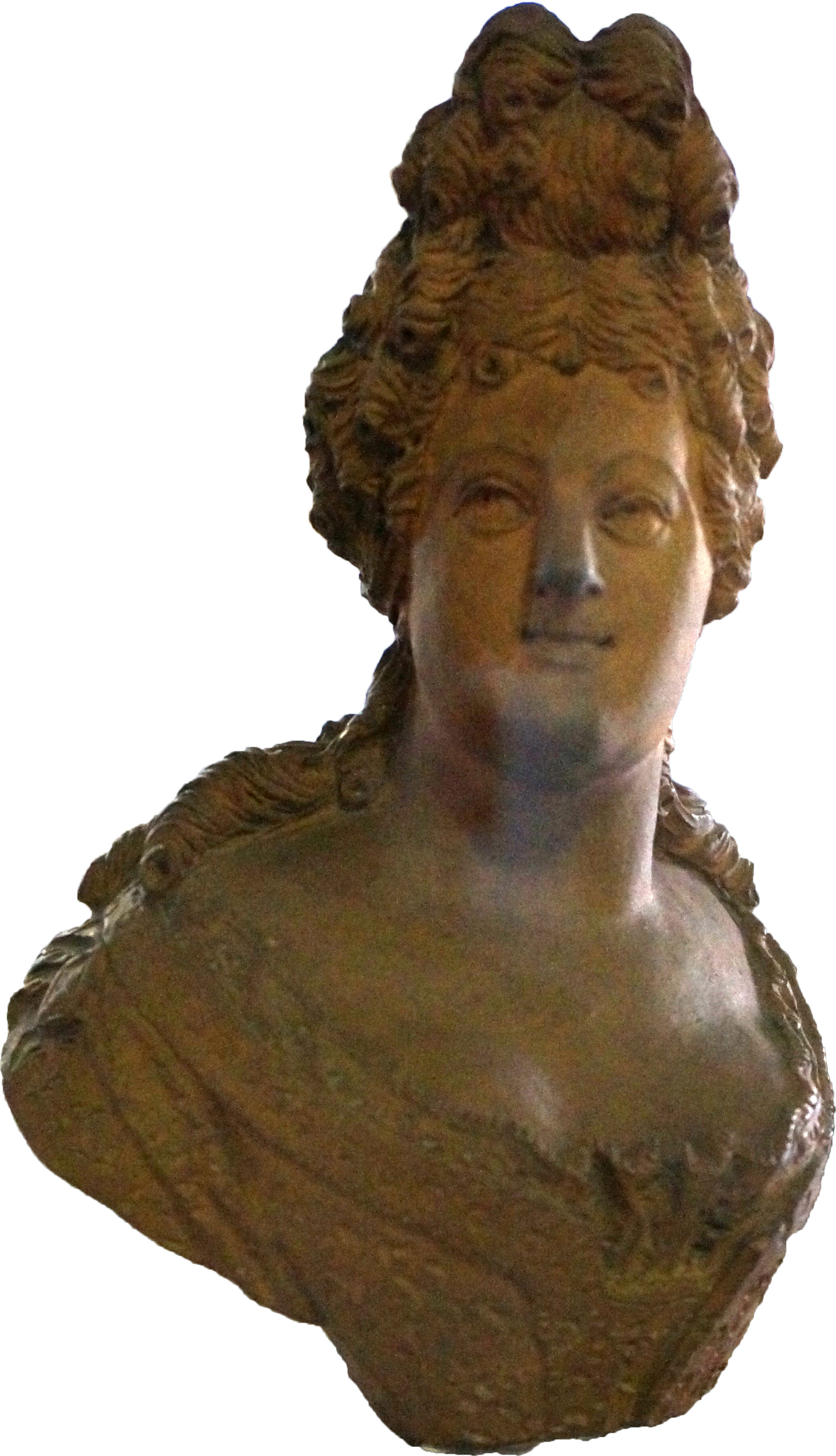 Sculptures présentées au Musée Lorrain .